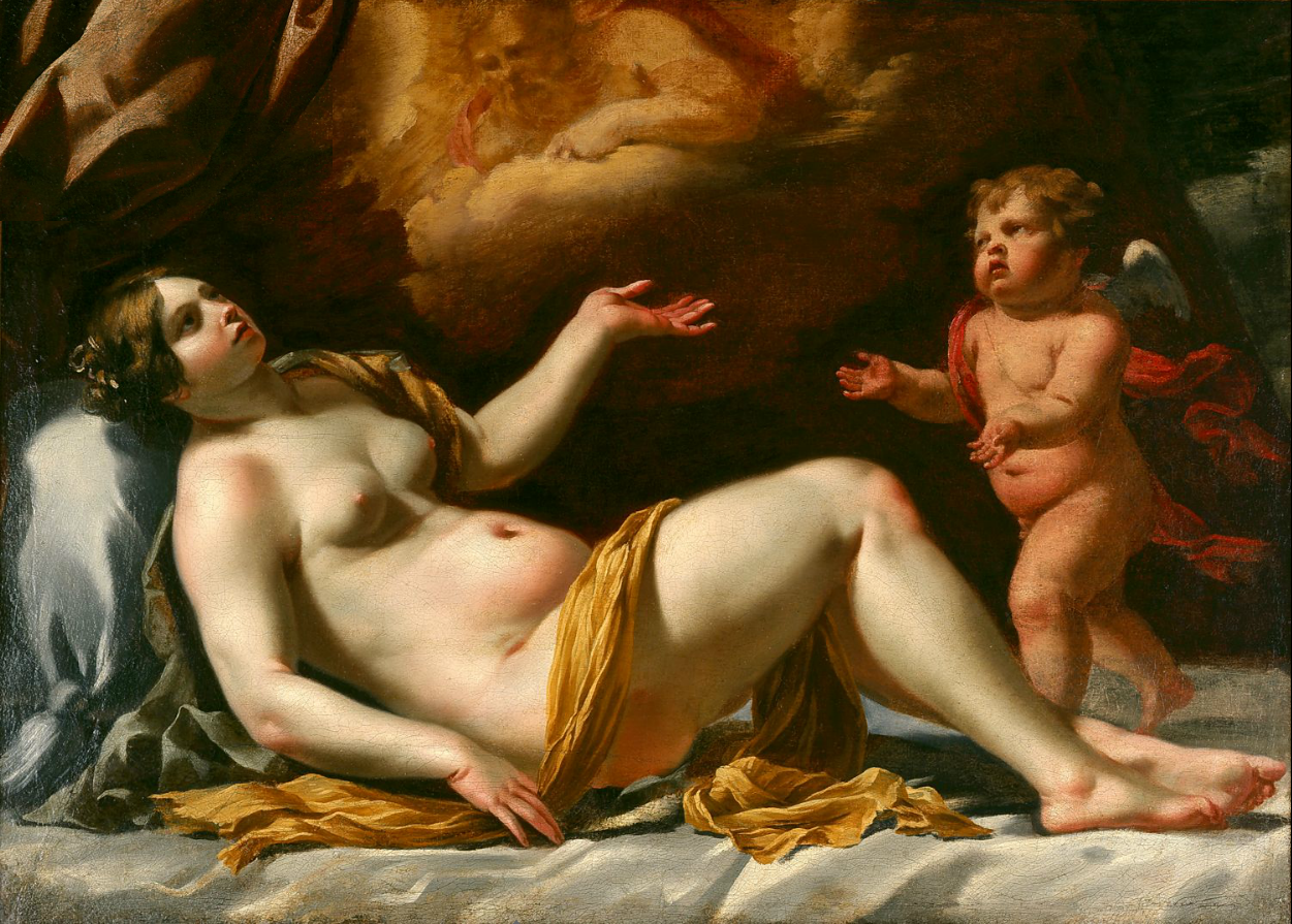 Danaë